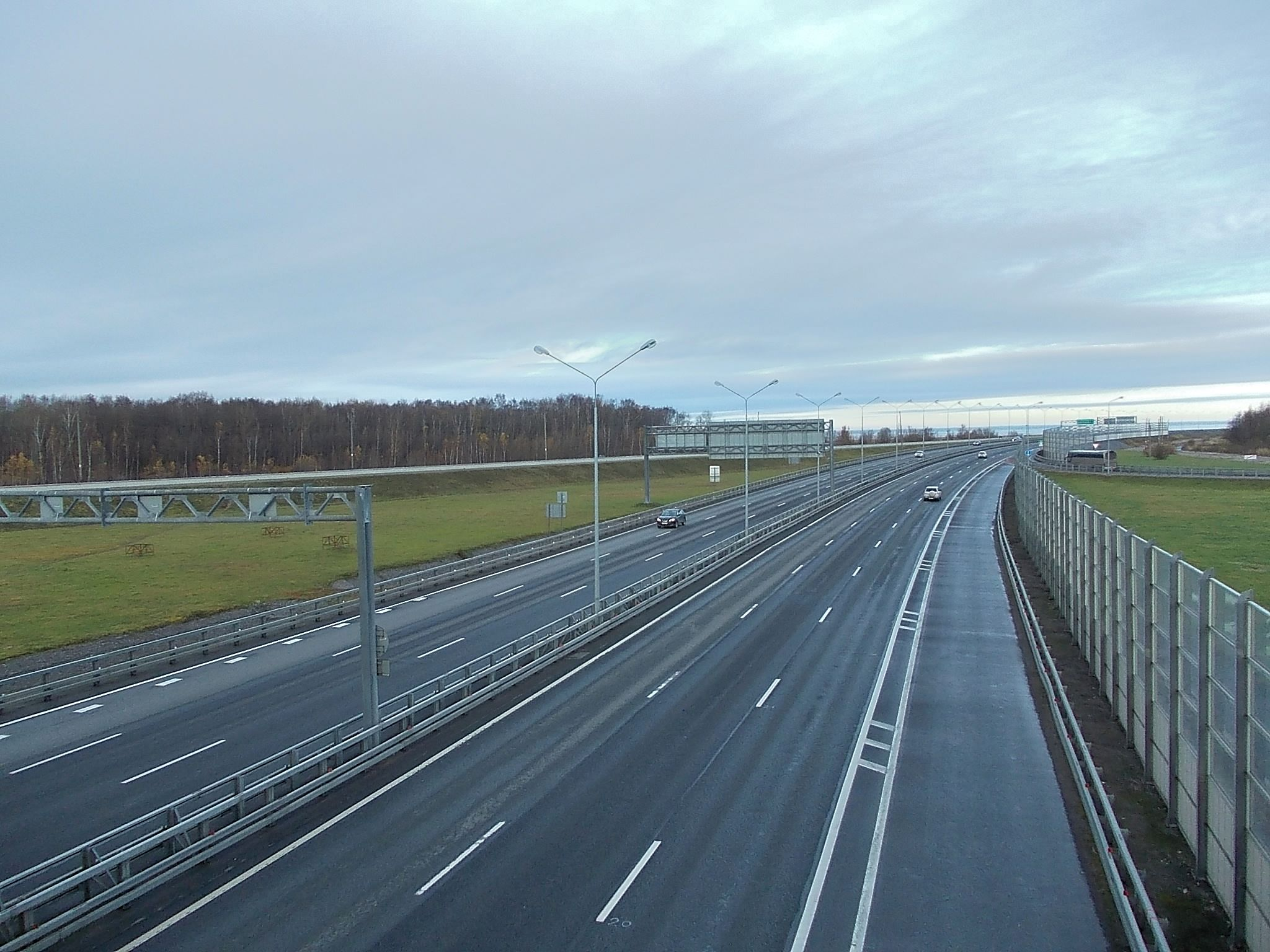 Вид с моста на Кроштадском шоссе